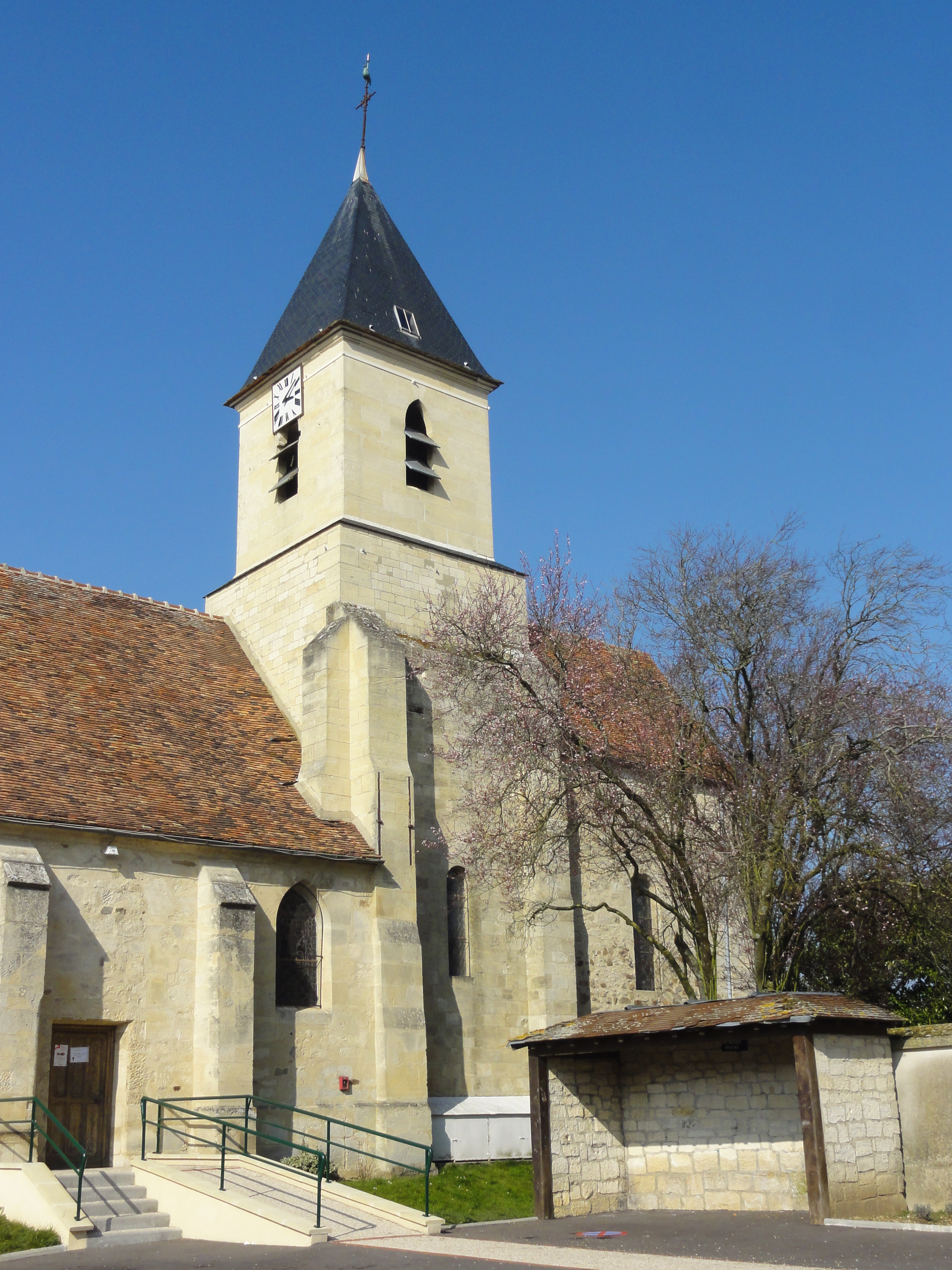 Église Saint-Nicolas de Fresnoy-en-Thelle - voir titre.